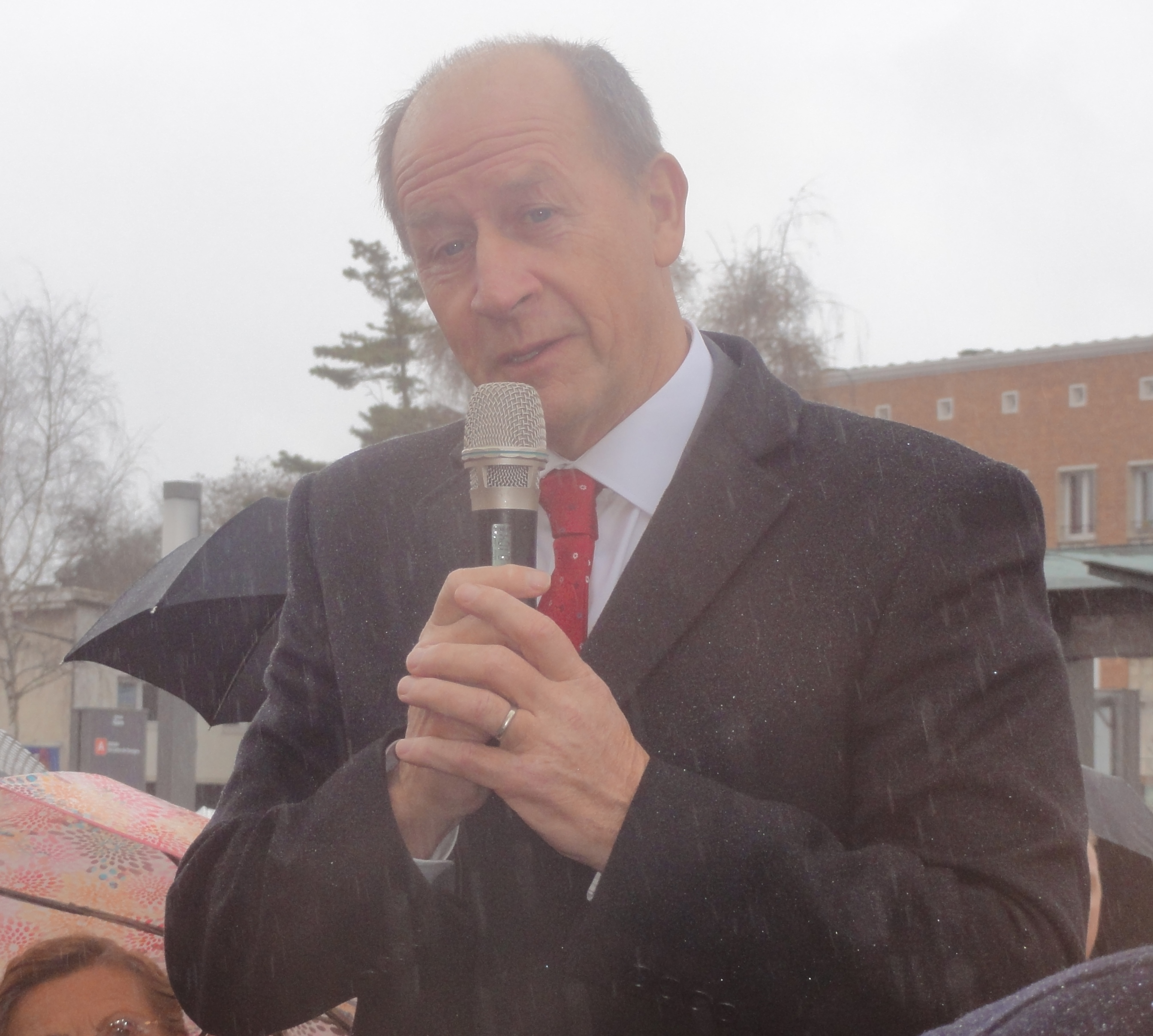 Manifestation contre la suppression des dessertes TGV en gare de Douai le 2 mars 2019. Depicted place: Douai railway station Depicted person: Dany Wattebled – French politician